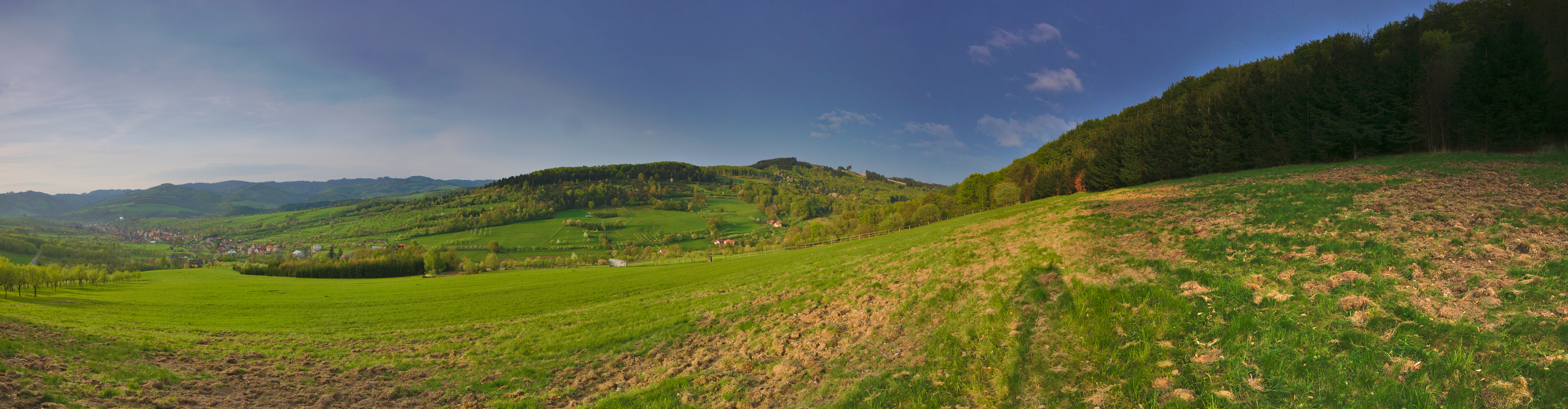 Panoramatický pohled na obec od jihu při západu slunce, Nedašov, okres Zlín